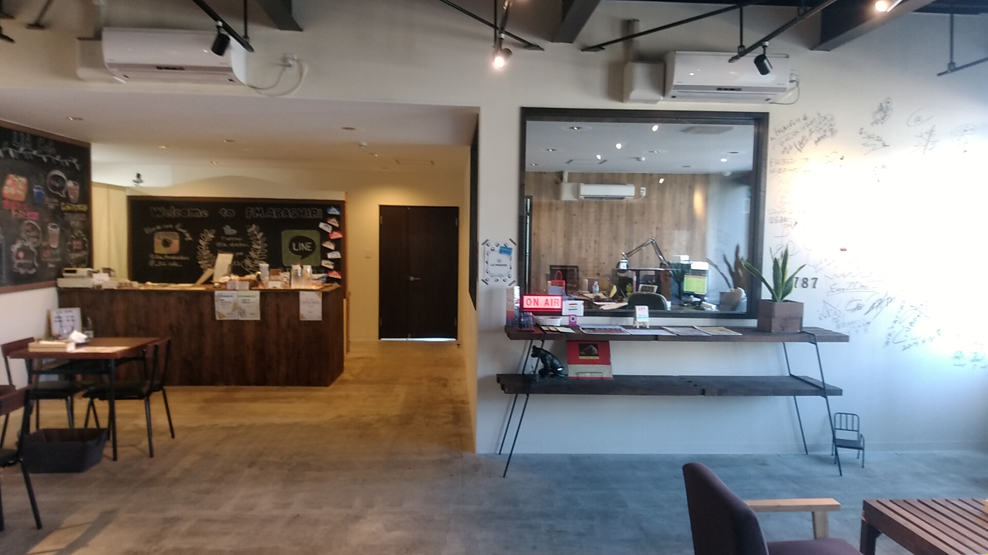 FM ABASHIRIのスタジオと併設するLIAカフェ内部。